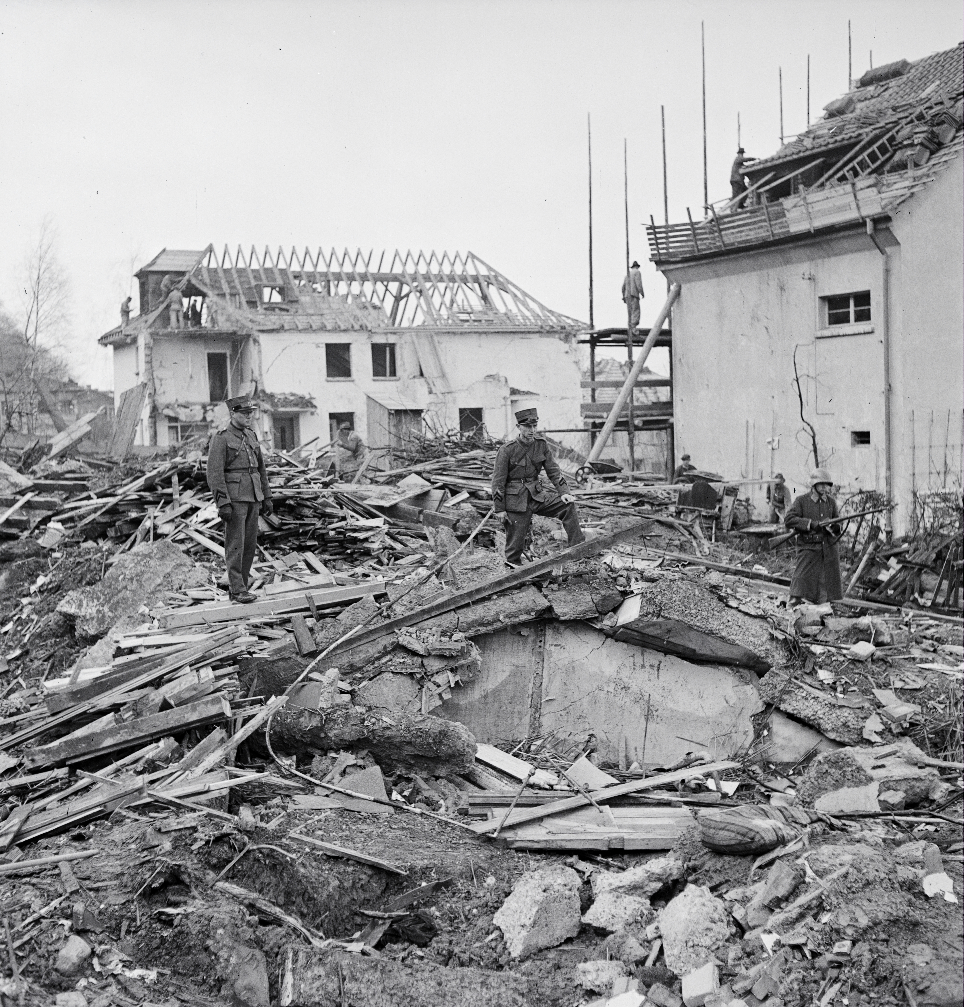 Bombenabwurf der US Air Force im Raum Milchbuck-Schwamendingen, Areal in der Nähe der Landwirtschaftlichen Schule Strickhof, Frohburgstrasse und In der Hub